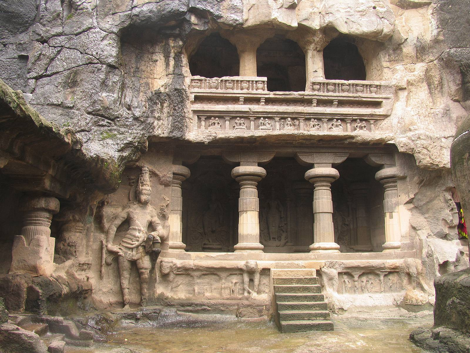 لبيسلبلب